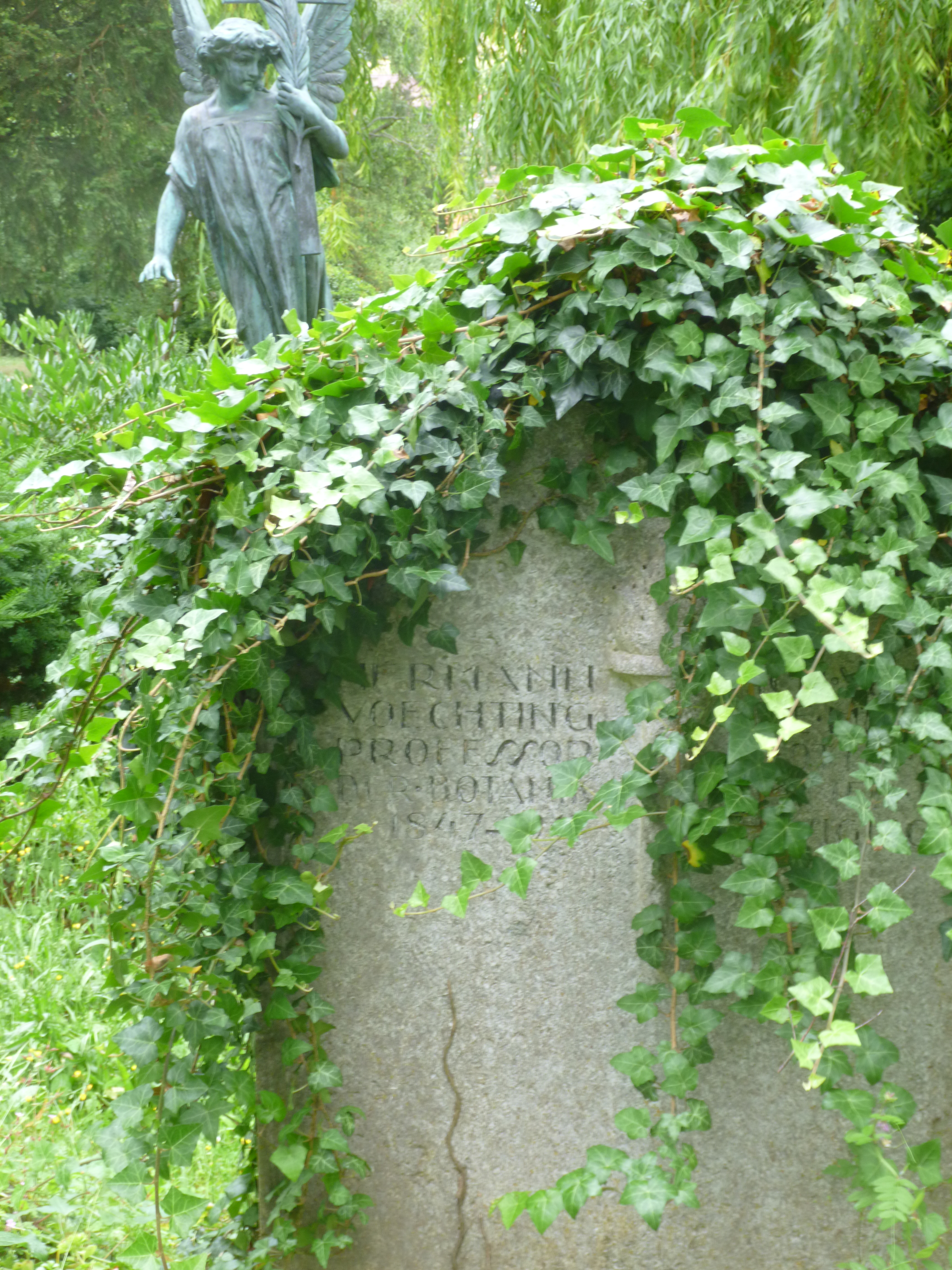 Hermann Voechting Stadtfriedhof Tübingen